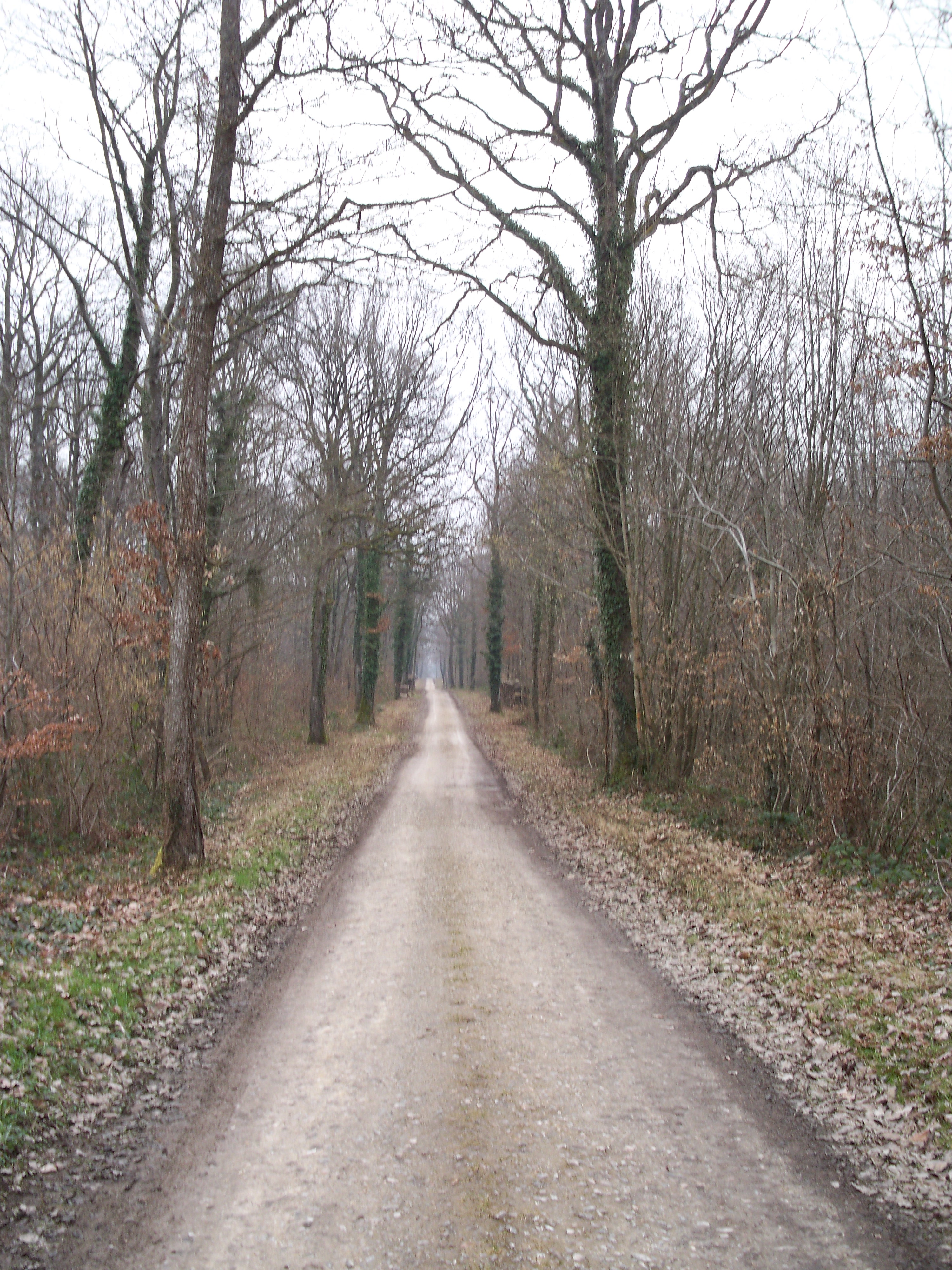 Forêt de Bucey-en-Othe, une commune française du département de l'Aube.